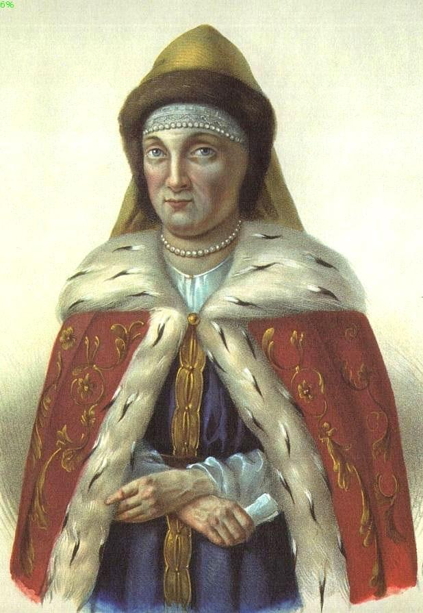 Борель Петр Федорович. Царевна Ирина Михайловна. 1855. Из изд-ния Э АлП/3-36 Российский царственный дом Романовых.- СПб, 1852-1860, л. 46